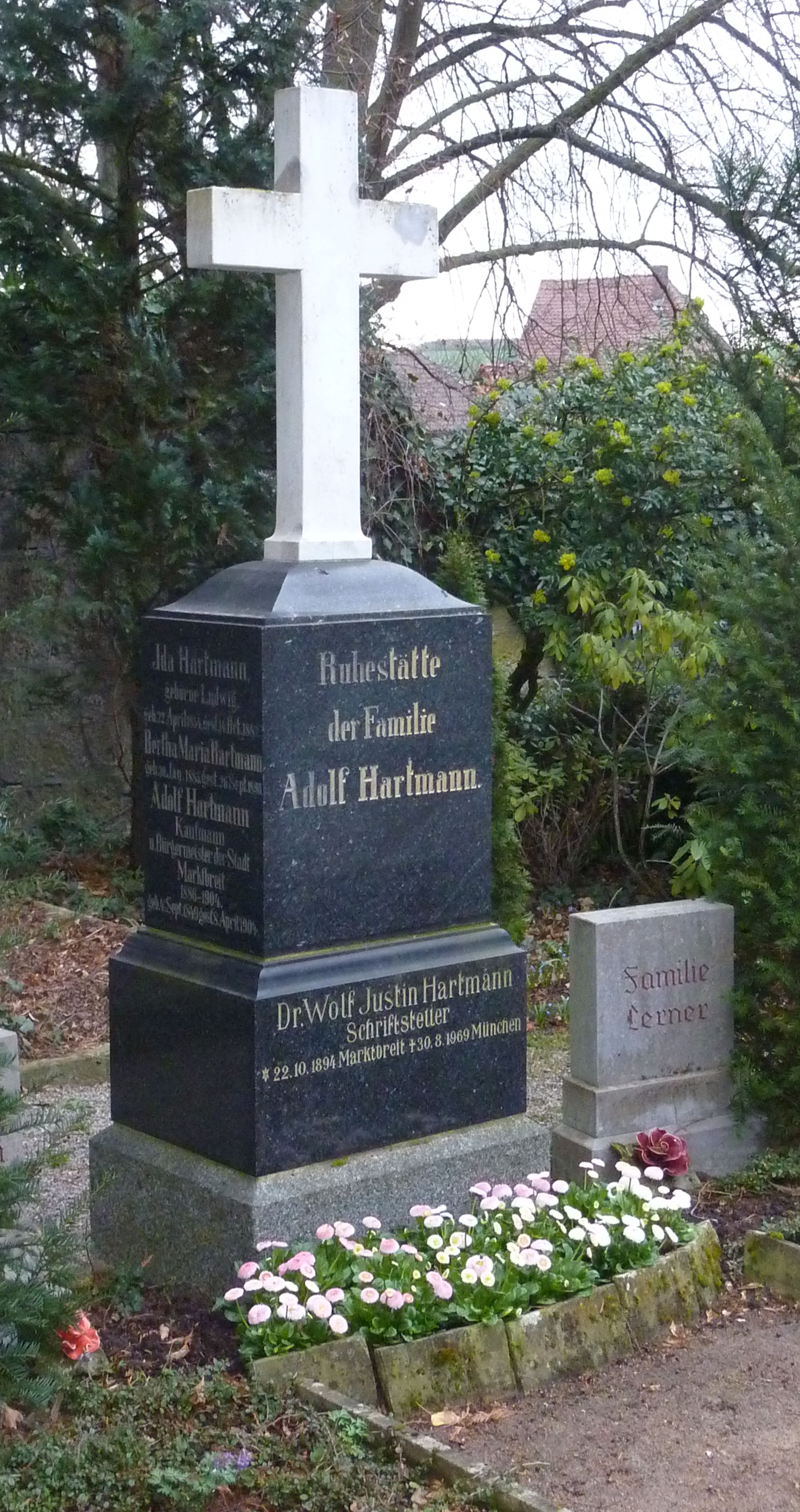 Grabstein des Wolf Justin Hartmann in Marktbreit